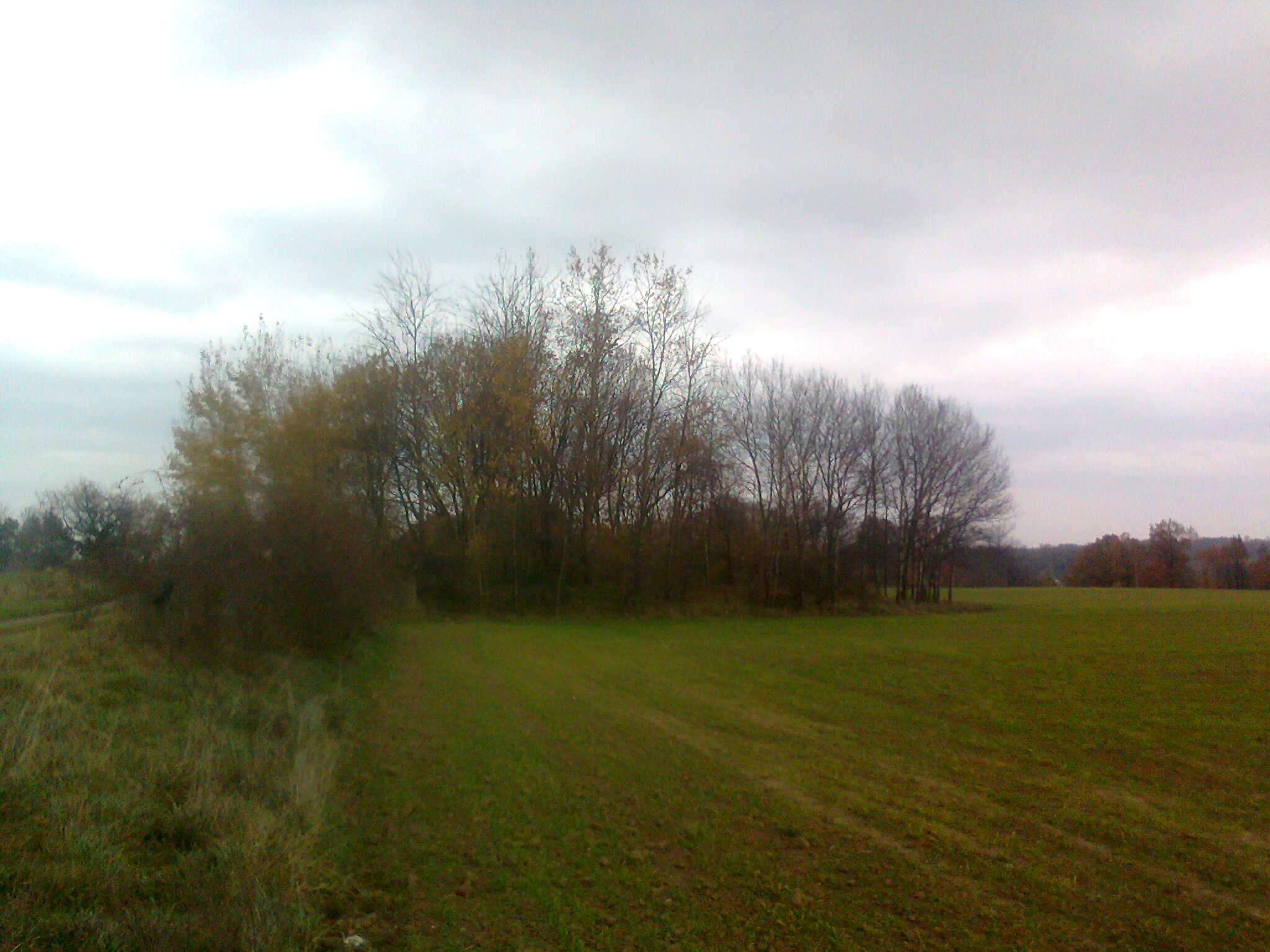 Sławniowice, gruzy przy tzw. „drodze czereśniowej“, rejon znaku granicznego nr 168/12 – widok od strony czeskiej